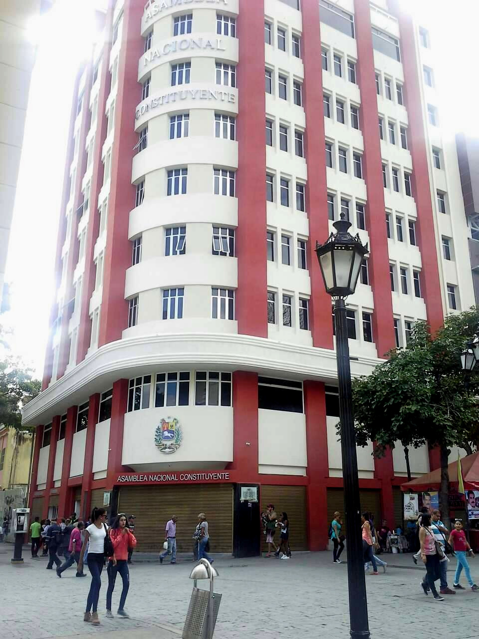 Antiguo Edificio La Francia, sede administrativa de la Asamblea Nacional Constituyente de Venezuzela de 2017 en la Plaza Bolívar, Caracas.